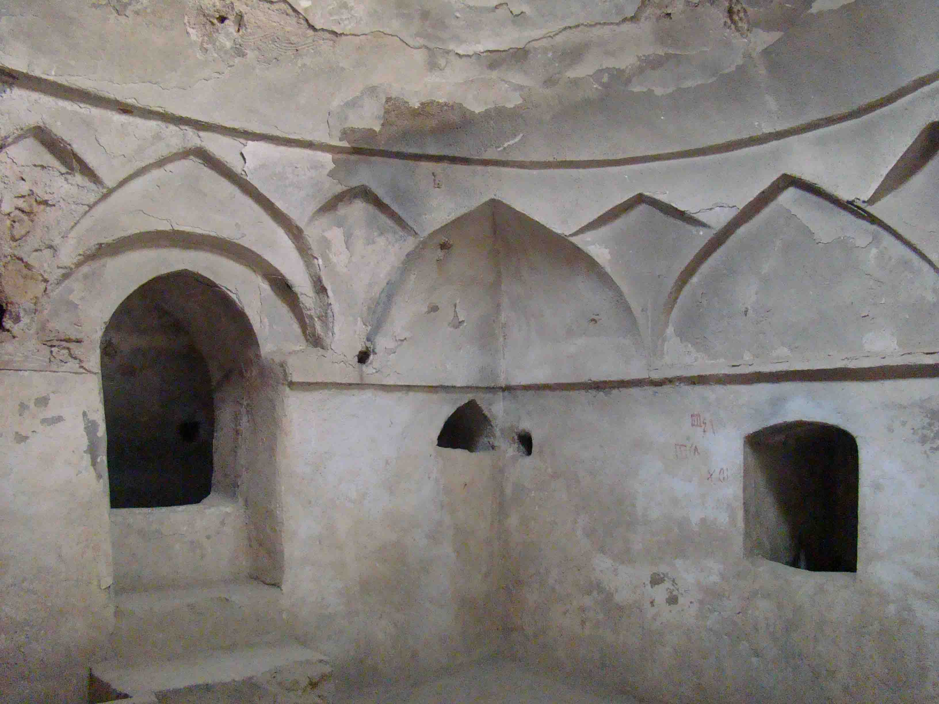 حمام خضر جويم نمای داخلی